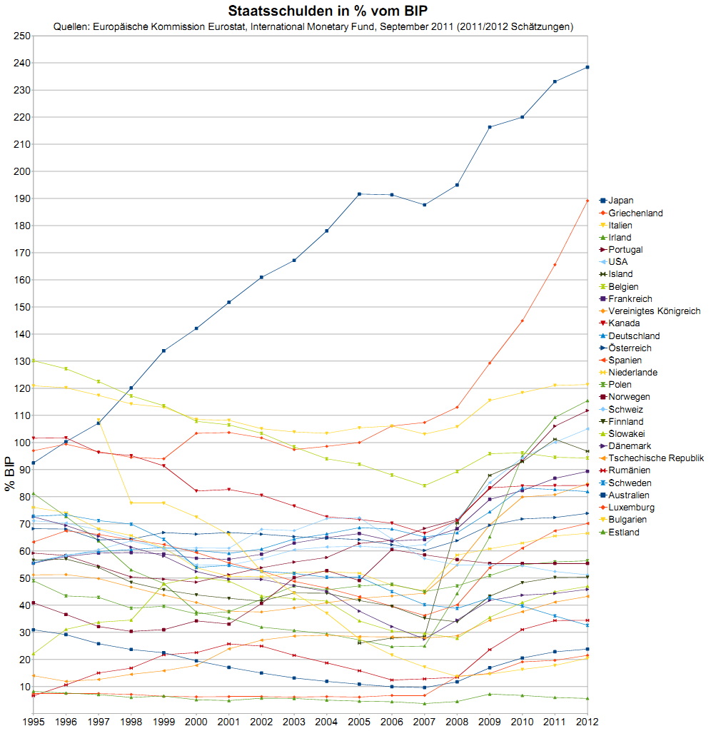 Schuldenquote ausgewählter, vorwiegend europäischer Länder. Aktuelle Daten von September 2011